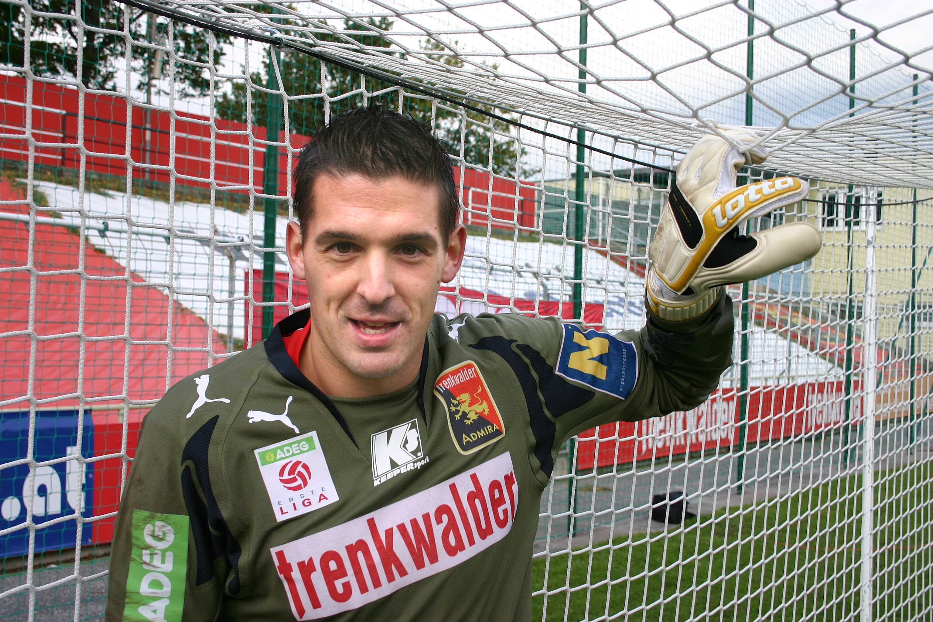 Thomas Mandl – Trenkwalder Admira Wacker (Bild 1)